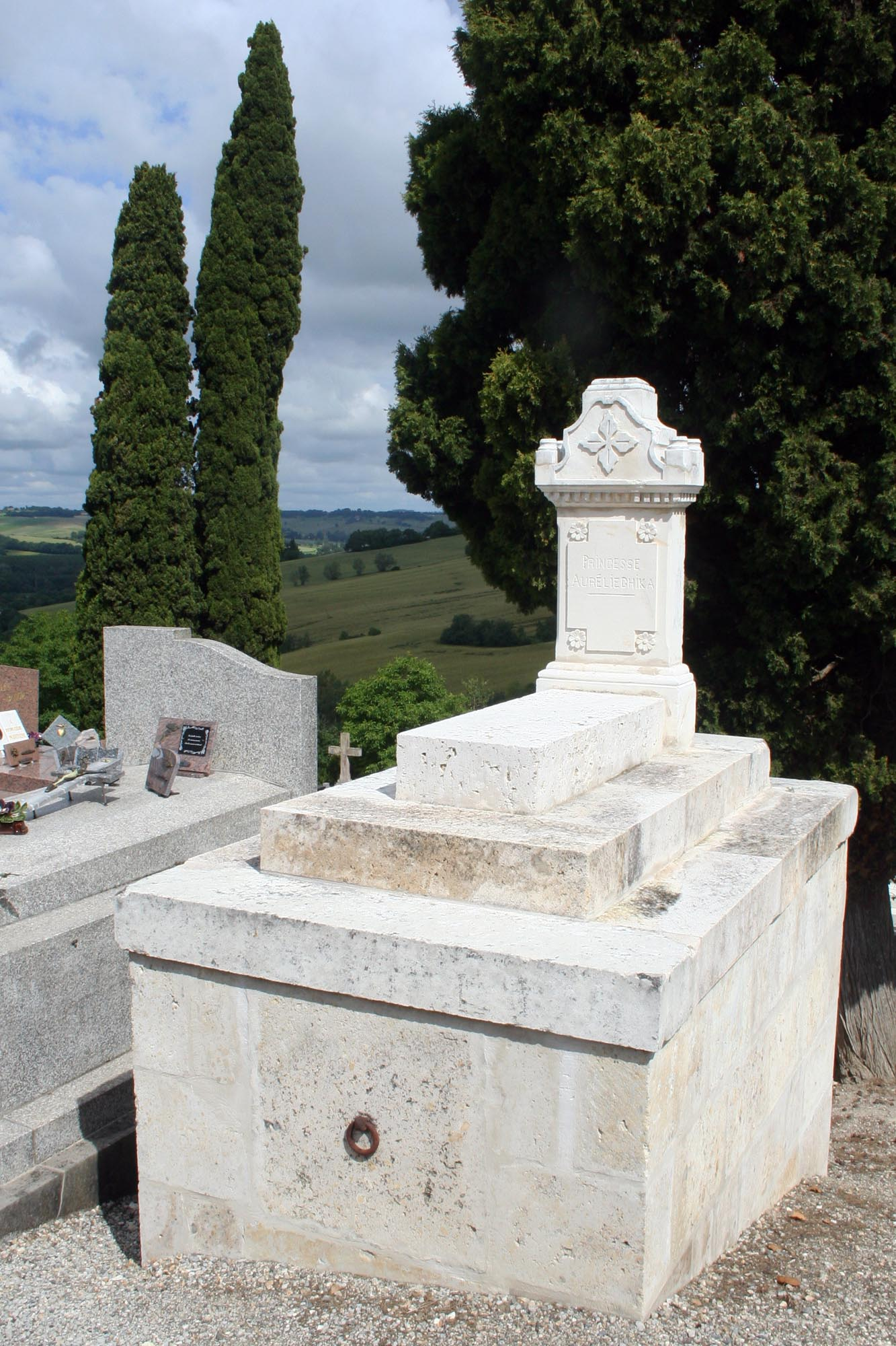 Tombeau de la princesse Aurélie Ghika à Lectoure (Gers, France)